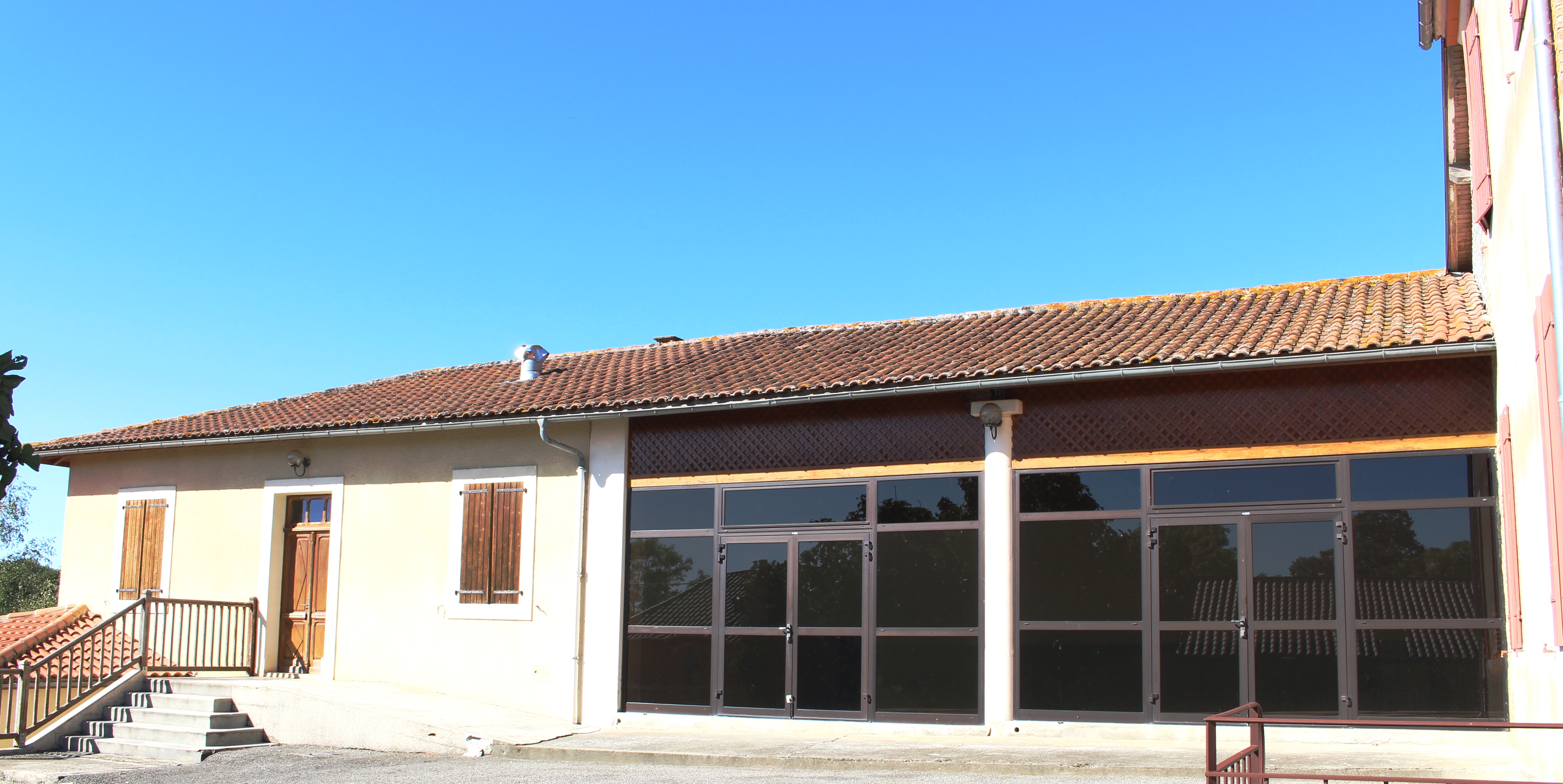 Salle des fêtes de Luby-Betmont (Hautes-Pyrénées)